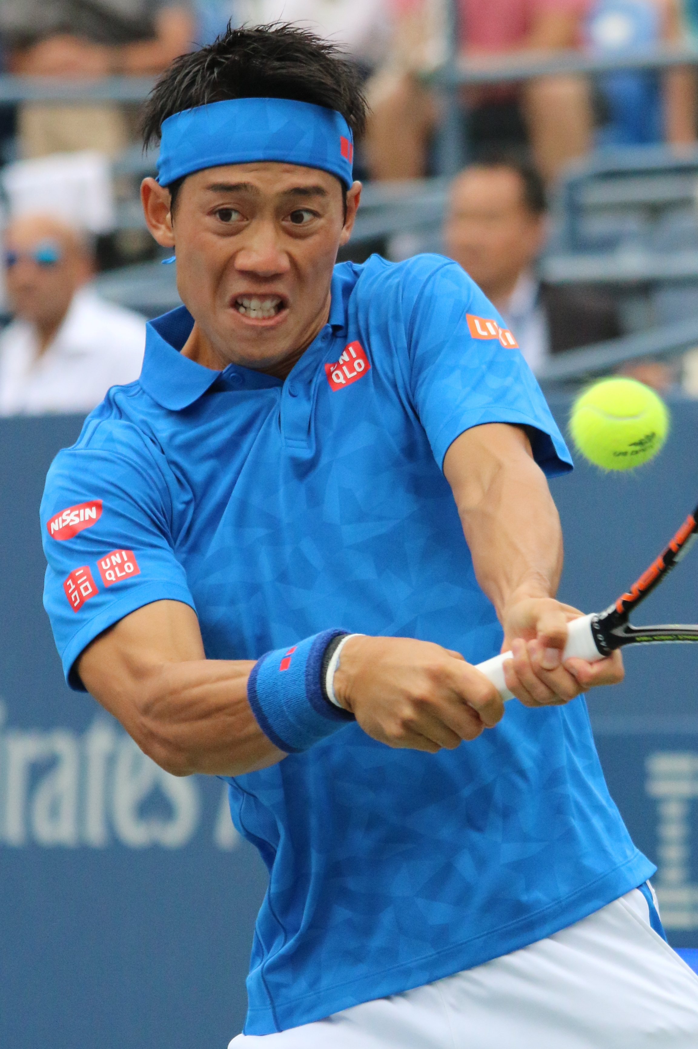 Nishikori US16 (53)